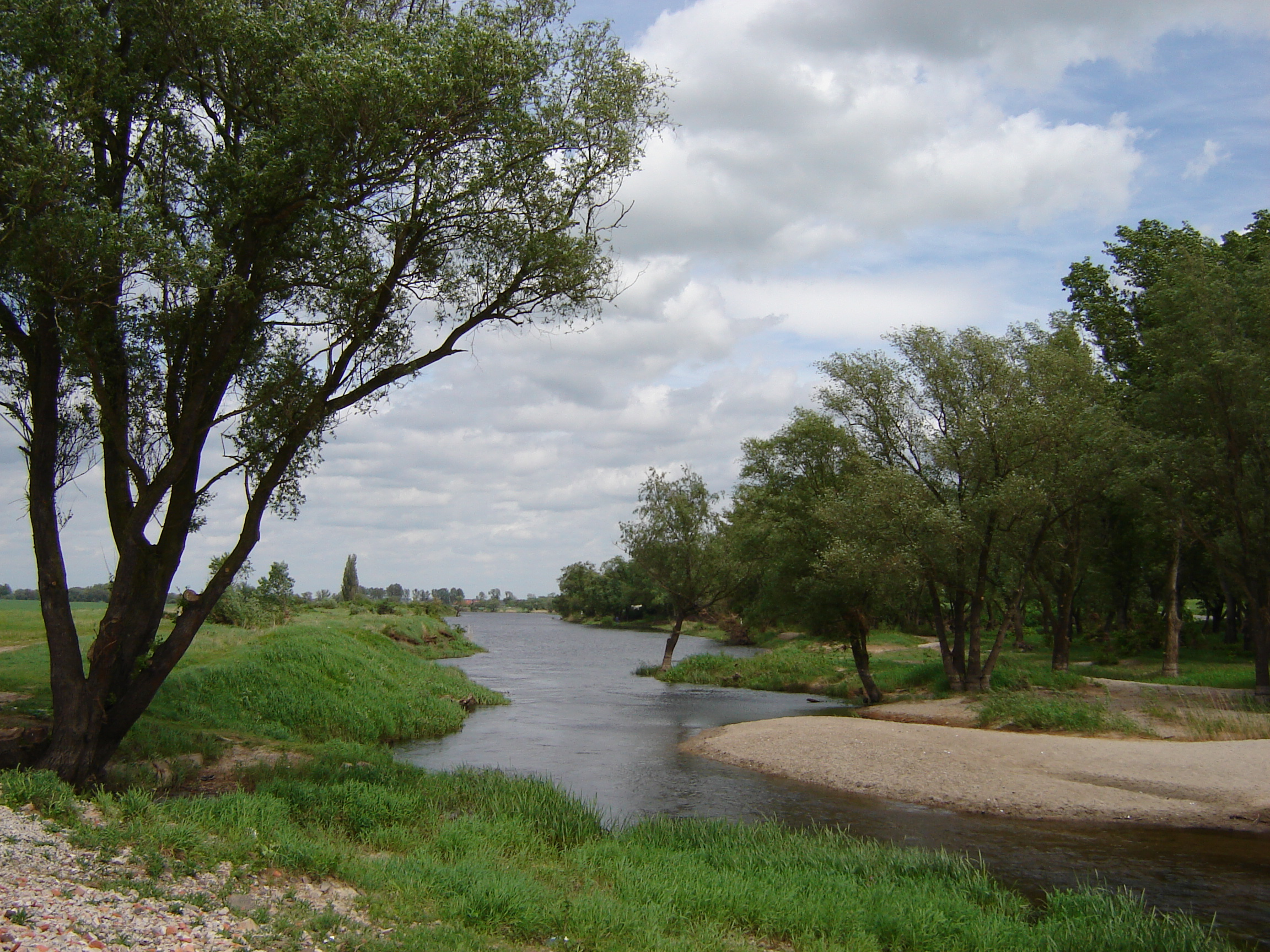 Elbe-Umflutkanal bei Biederitz (Sachsen-Anhalt)